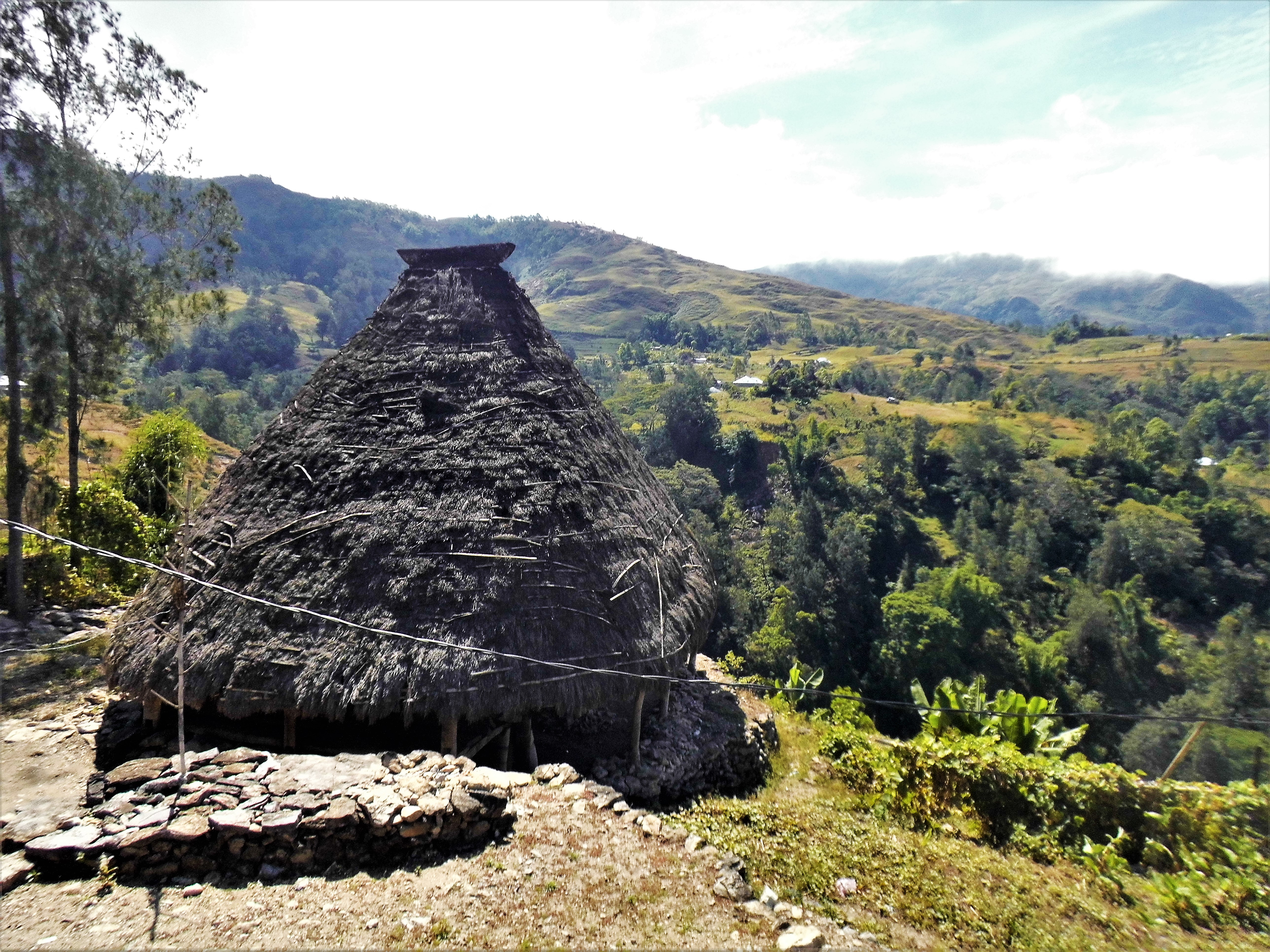 Uma Lulik in Maubisse